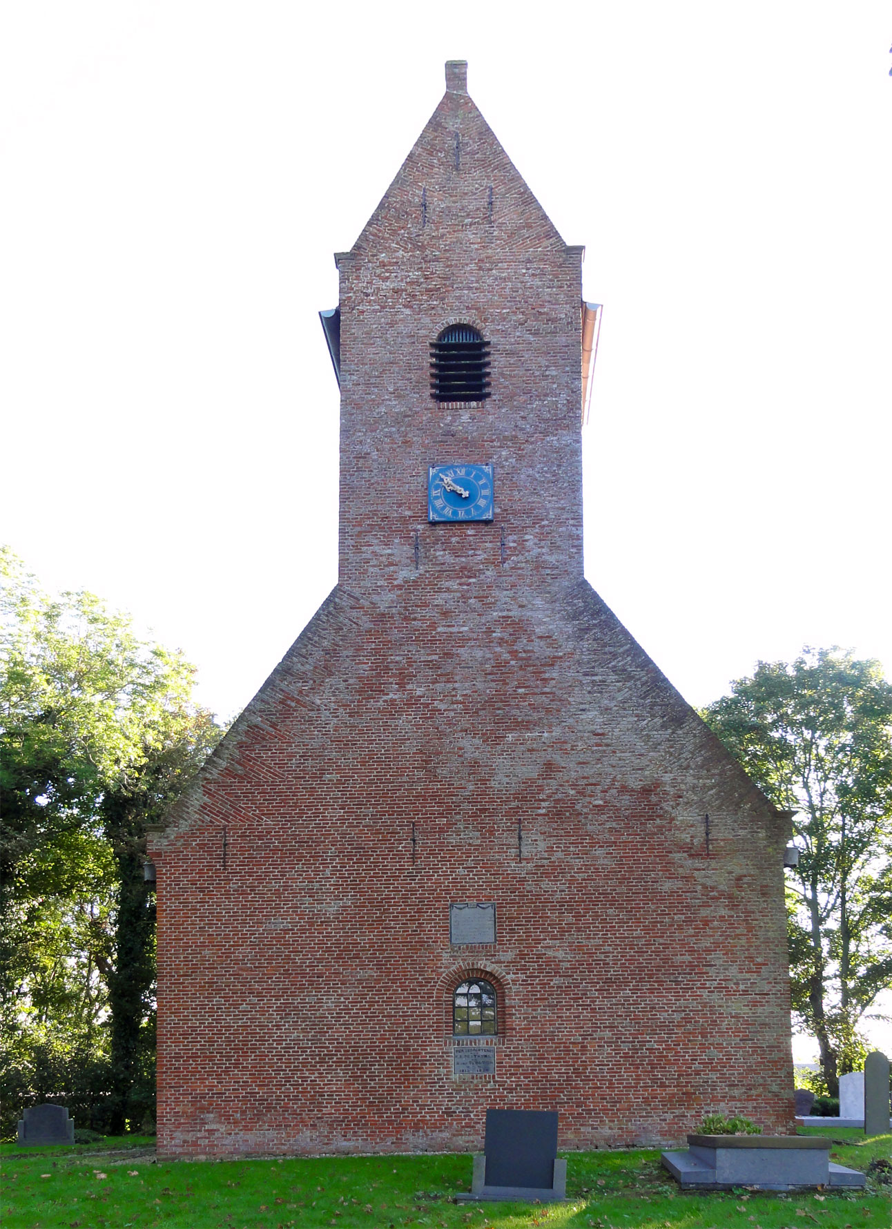 Sint-Thomaskerk van Waaxens, rijksmonument